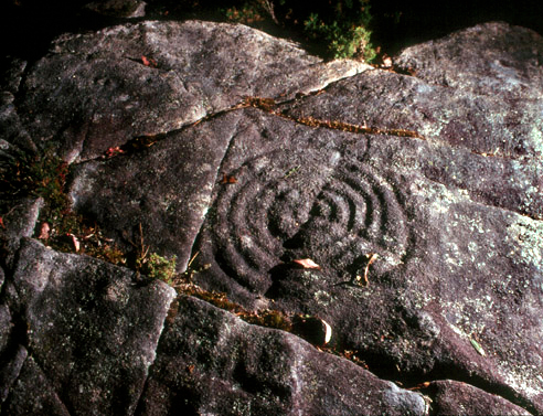 Petroglifo en . Licensing Categoría:Imaxes de petróglifos da provincia da Coruña Categoría:Imaxes de Teo